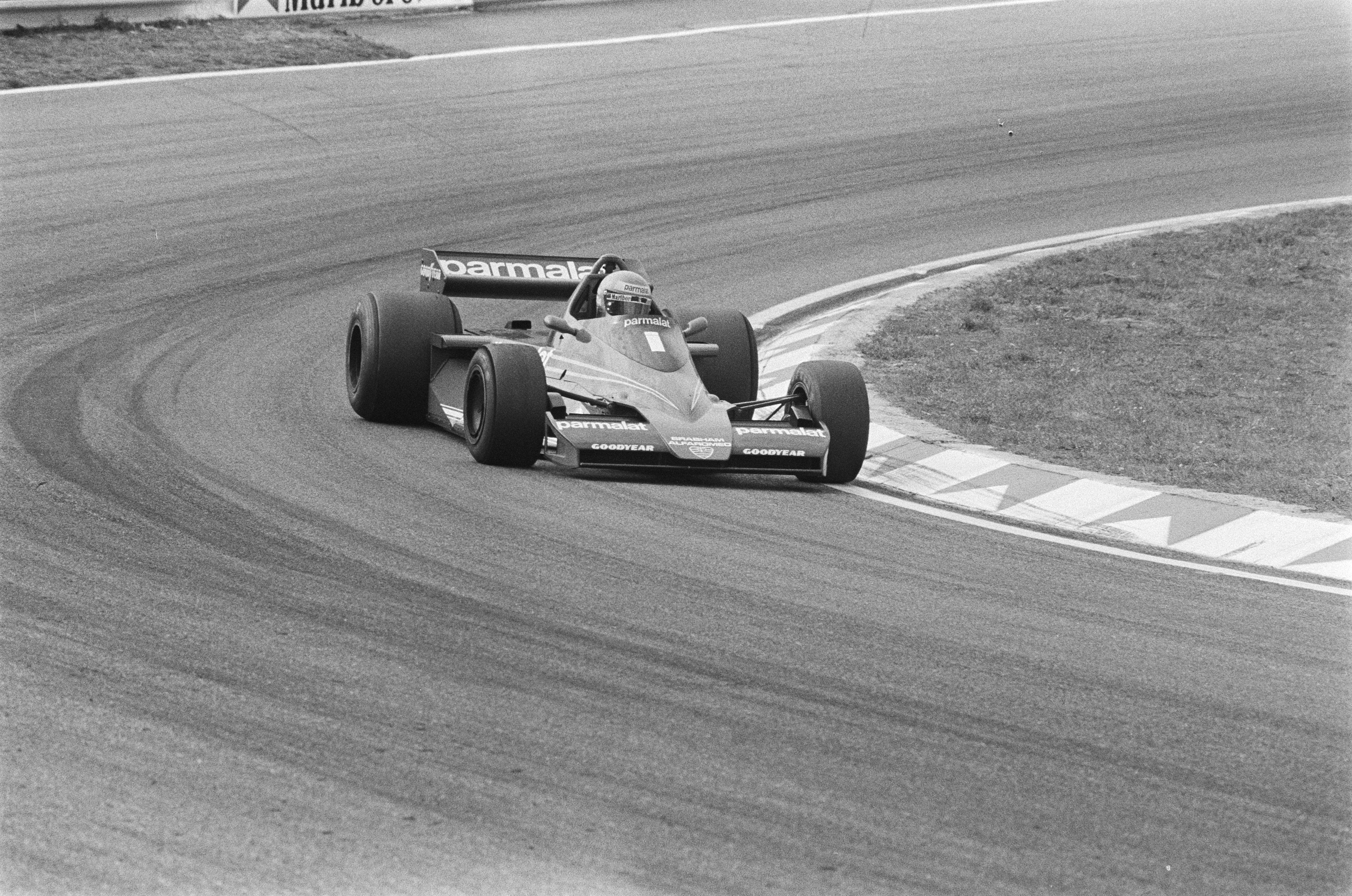 Grand Prix Zandvoort; Niki Lauda in actie.